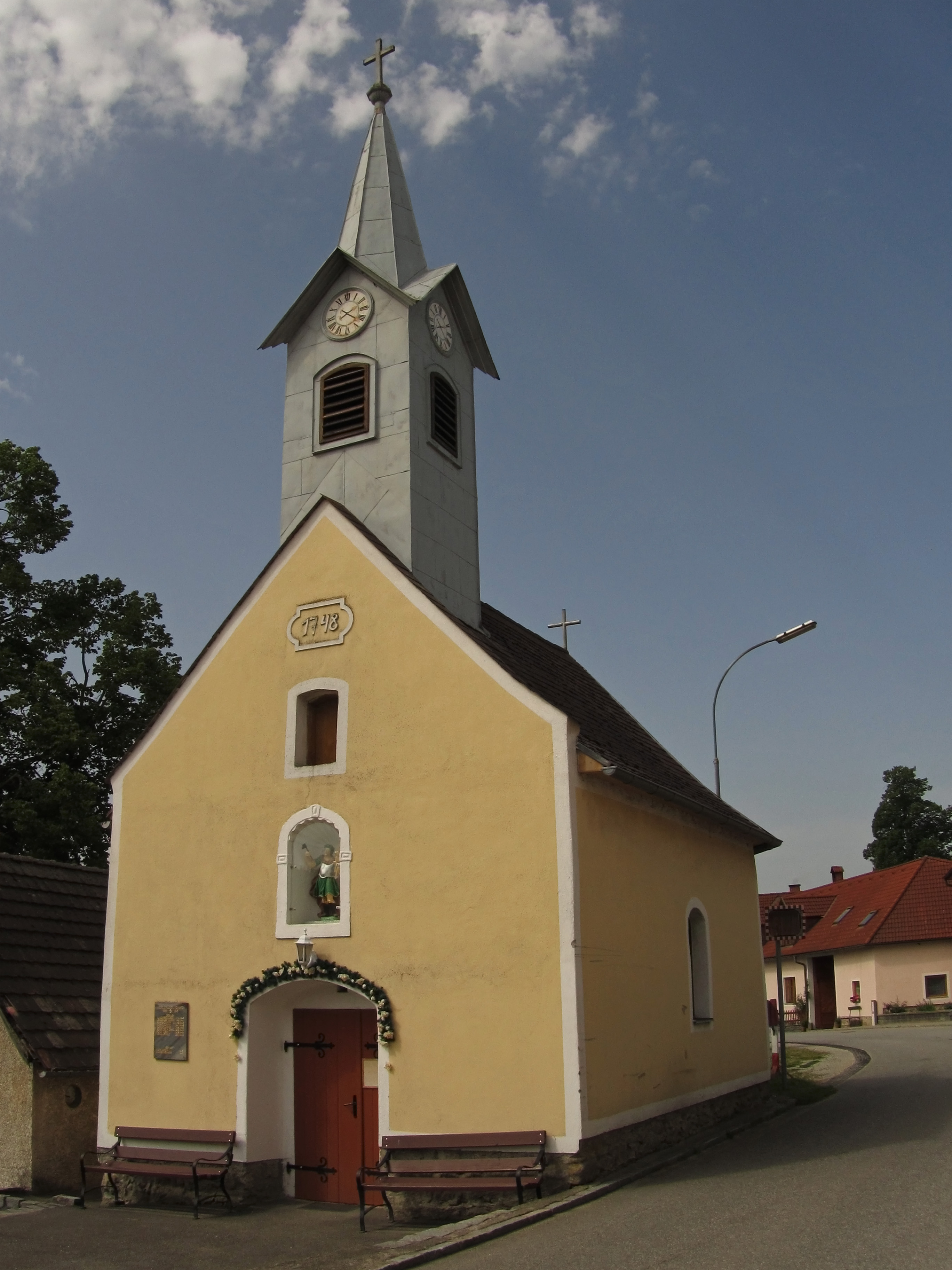 Die 1748 errichtete Ortskapelle besitzt einen barocken Säulenaltar aus der ersten Hälfte des 18. Jahrhunderts.